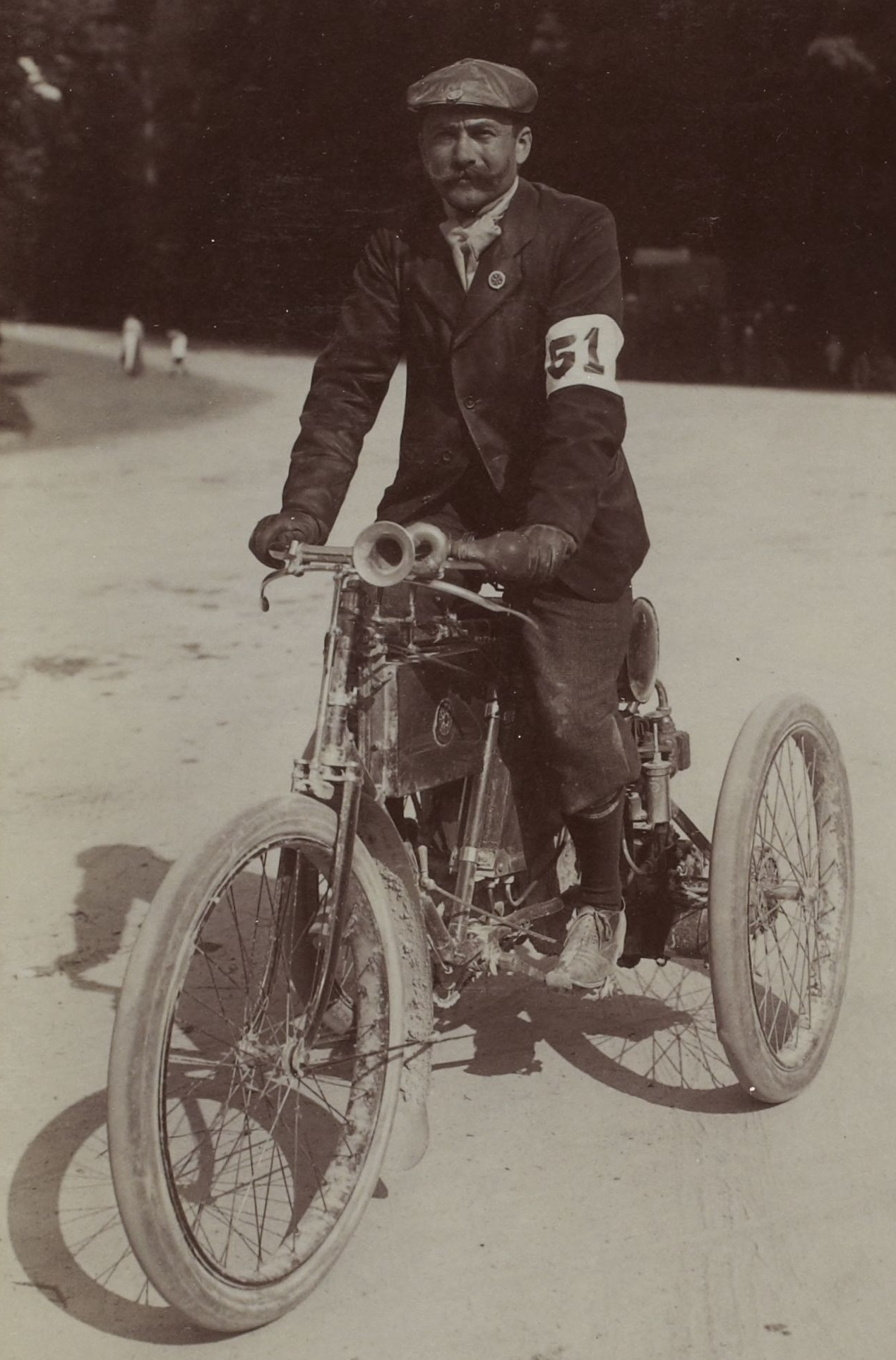 [Collection Jules Beau. Photographie sportive] : T. 9. Année 1899 / Jules Beau : F. 30. [Rallie-Papiers de la Vie au Grand Air, Fontainebleau]